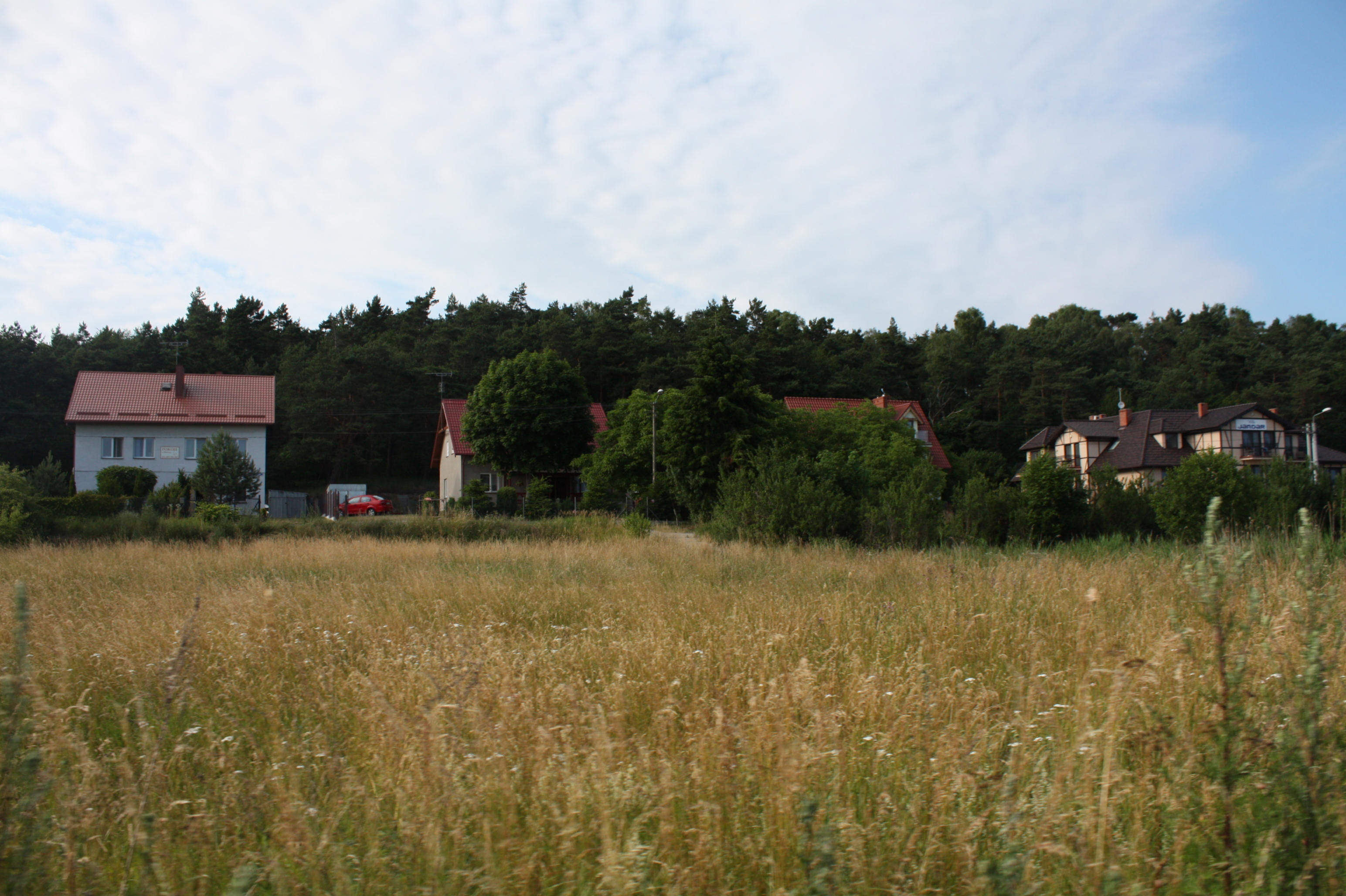 Skowronki k. Kąt Rybackich